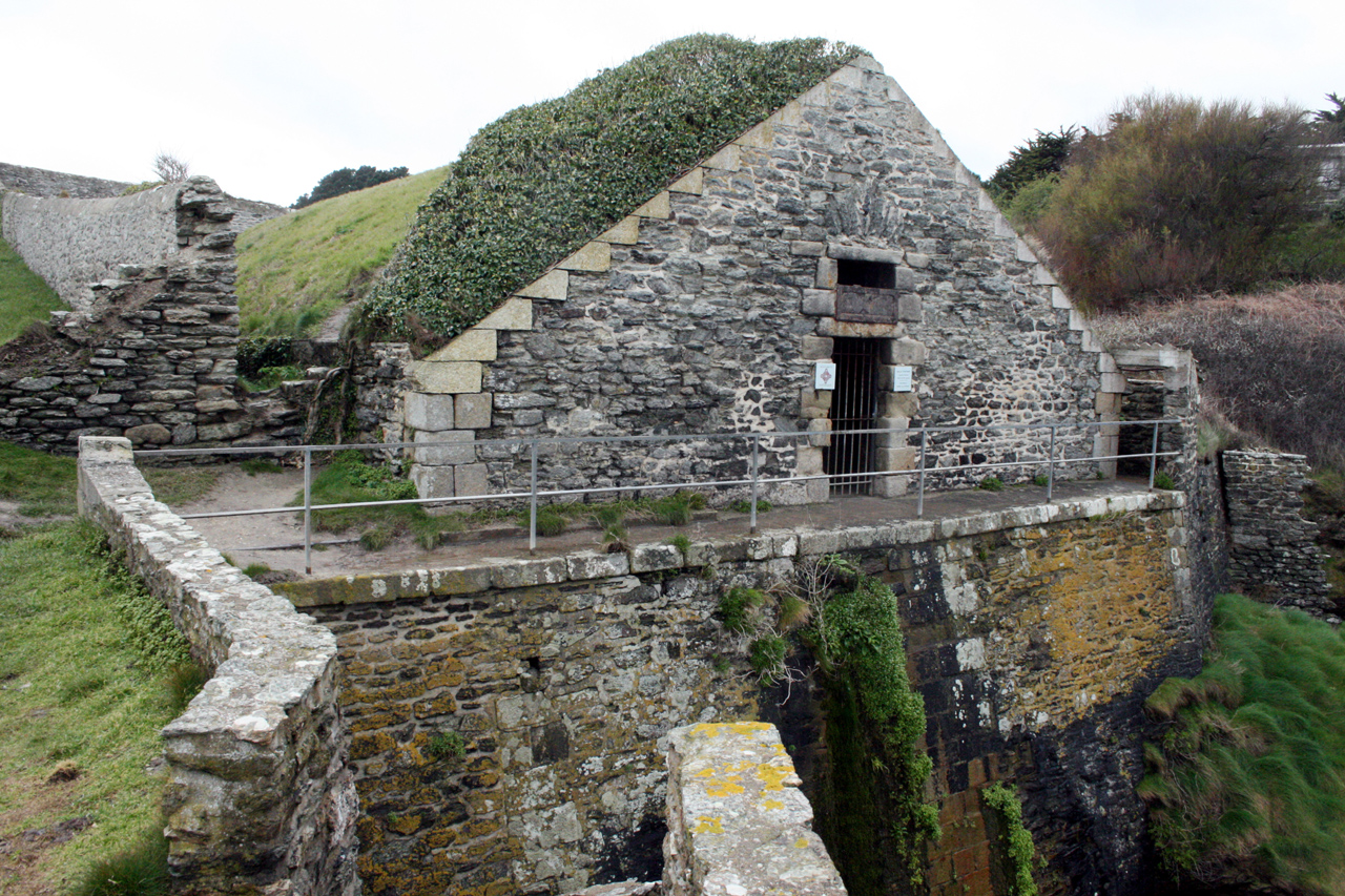 L'aiguade Vauban dite également Belle fontaine à Belle-Île-en-Mer (commune de Palais, Morbihan, Bretagne, France)